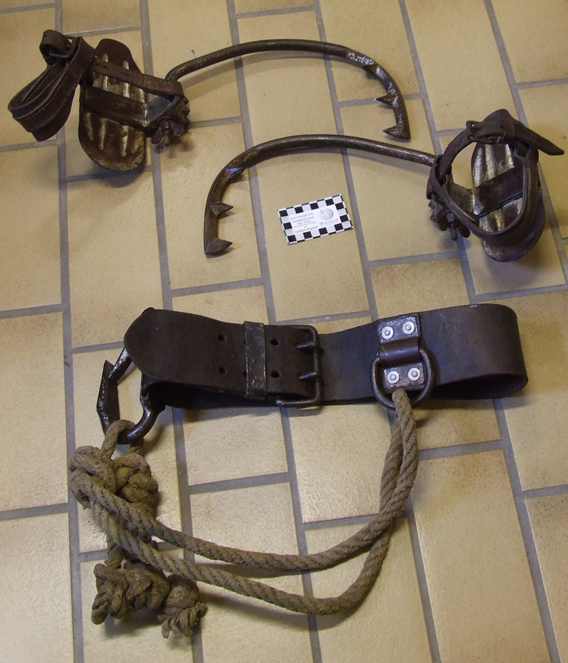 Steigeisen für Telegrafenmasten aus Holz mit "Sicherungsgurt" aus Leder und Seil.